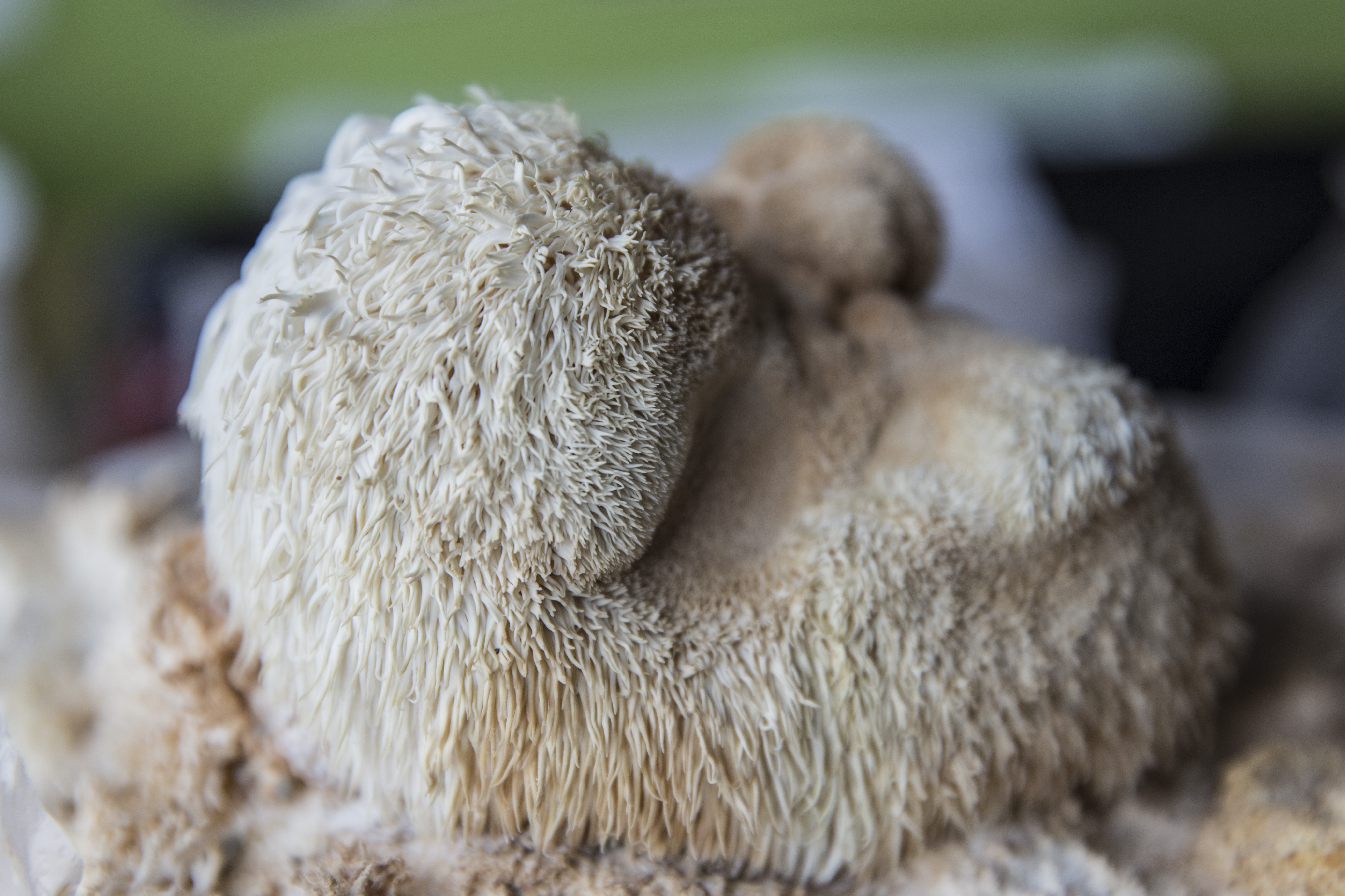 Fotografia grzyba - soplówki, wykonana w Centrum Nauki Kopernik w Warszawie